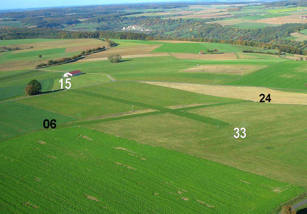 Ultraleichtfluggelände Dörzbach